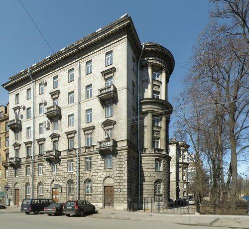 Дом 6— 1954,Сталинский неоклассицизм,Архитекторы: Гурьев О.И. , Фромзель В.М. В здании предусмотрено: своя котельная и бомбоубежище.Построено для работников НПО им.Климова В.Я.